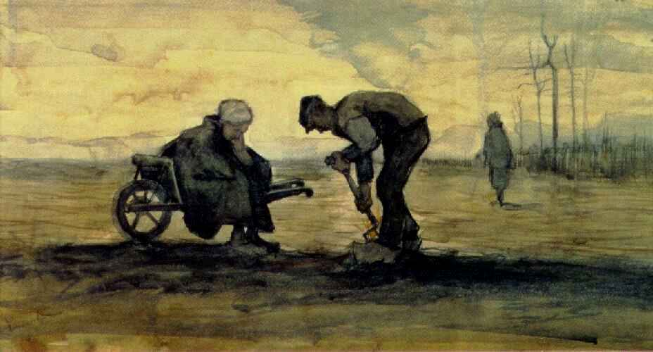 Pintura estancia en La Haya